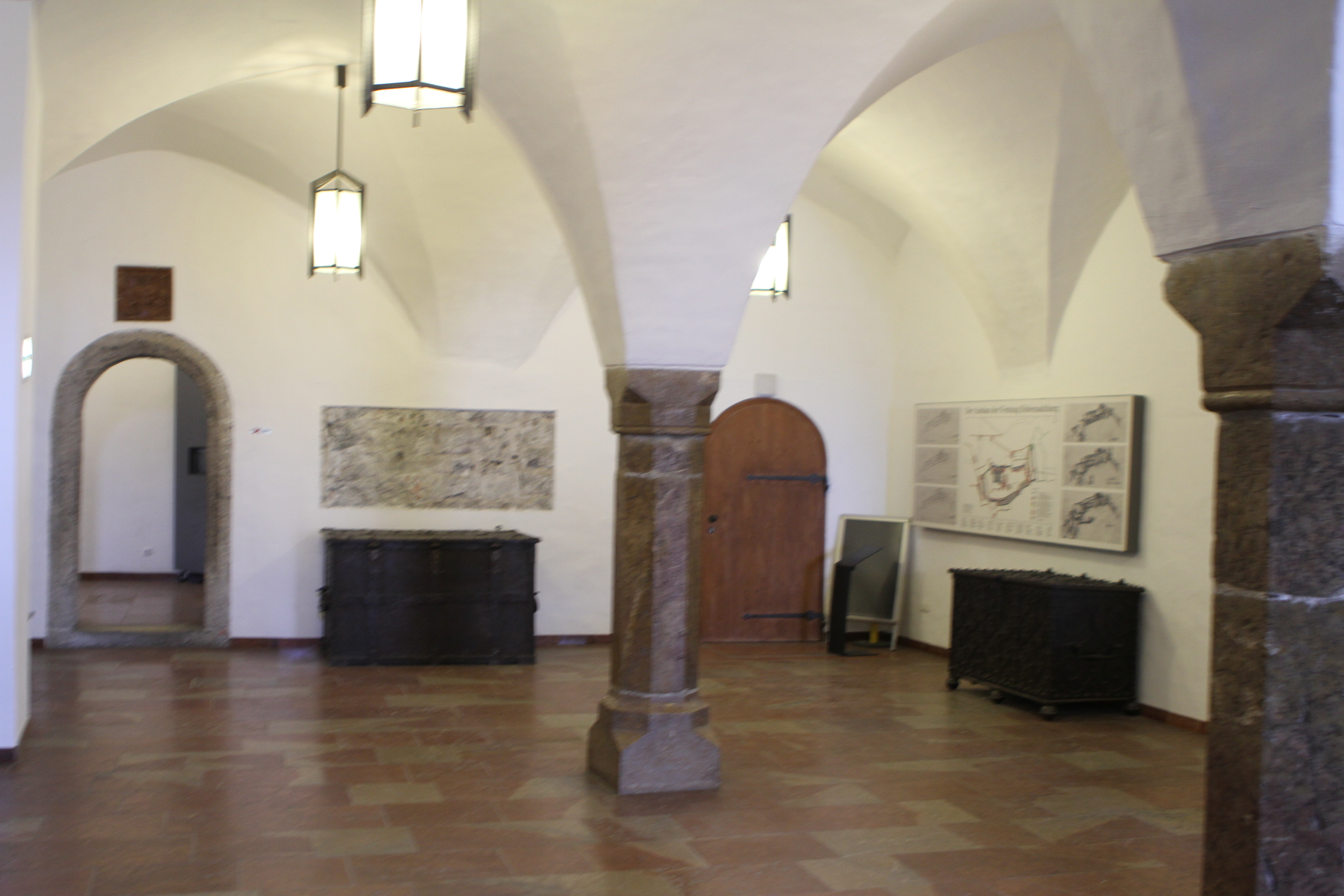 Festung Hohensalzburg Gesamtanlage, Freiflächen archäologisches Fundhoffnungsgebiet